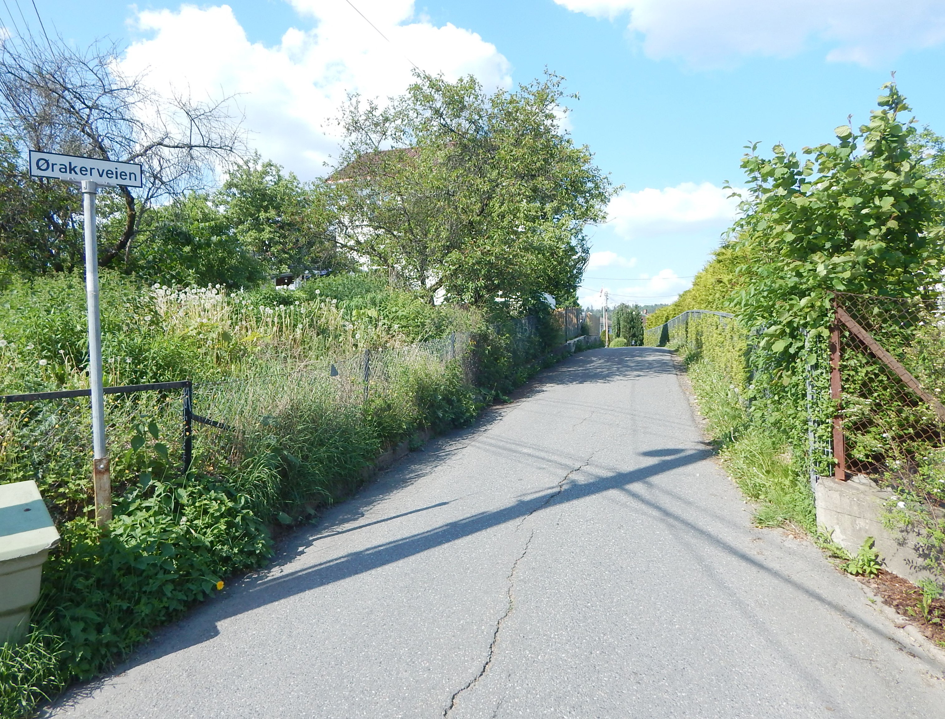 Ørakerveien